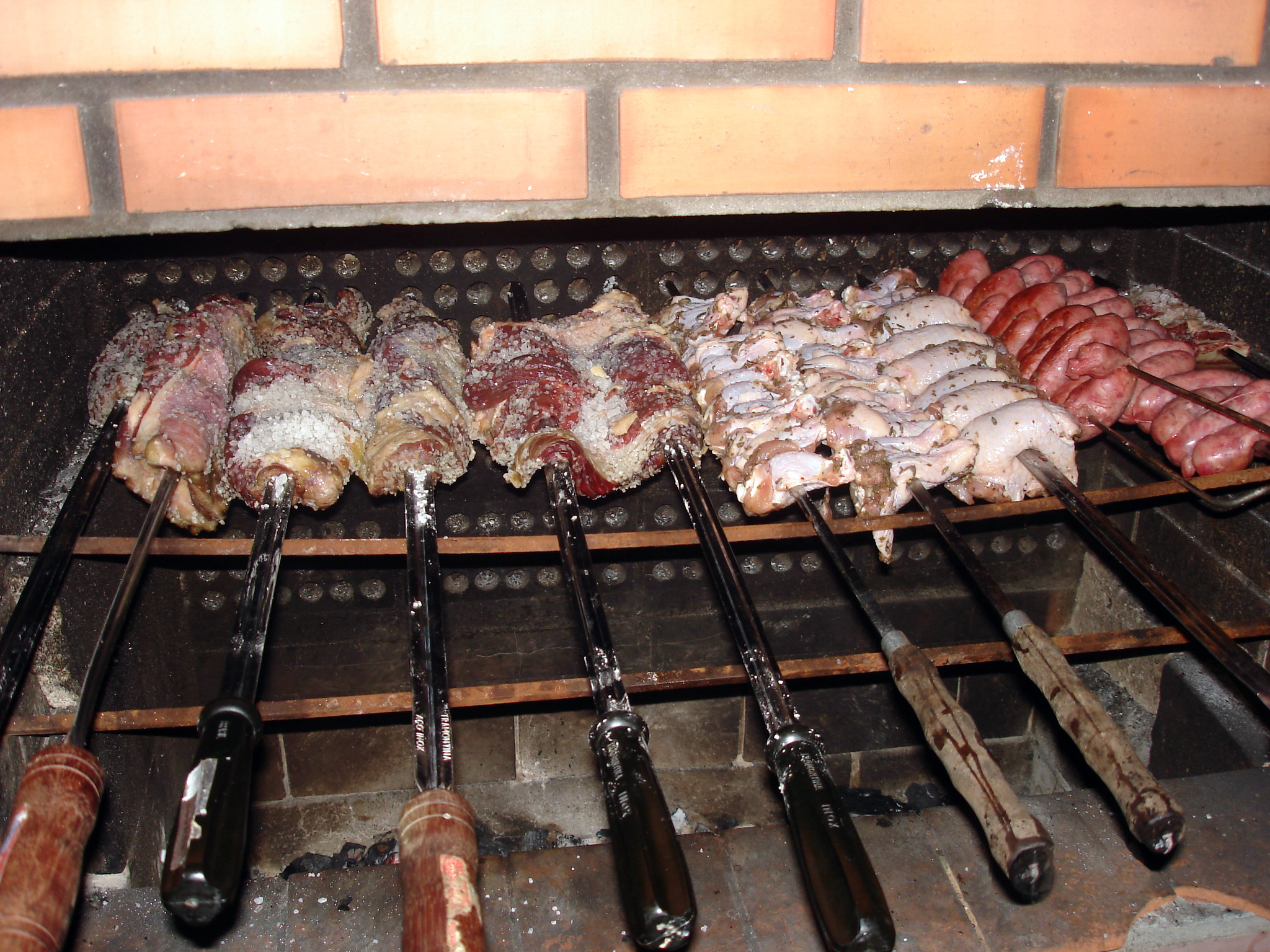 Churrasco Gaúcho assando numa churrasqueira residencial